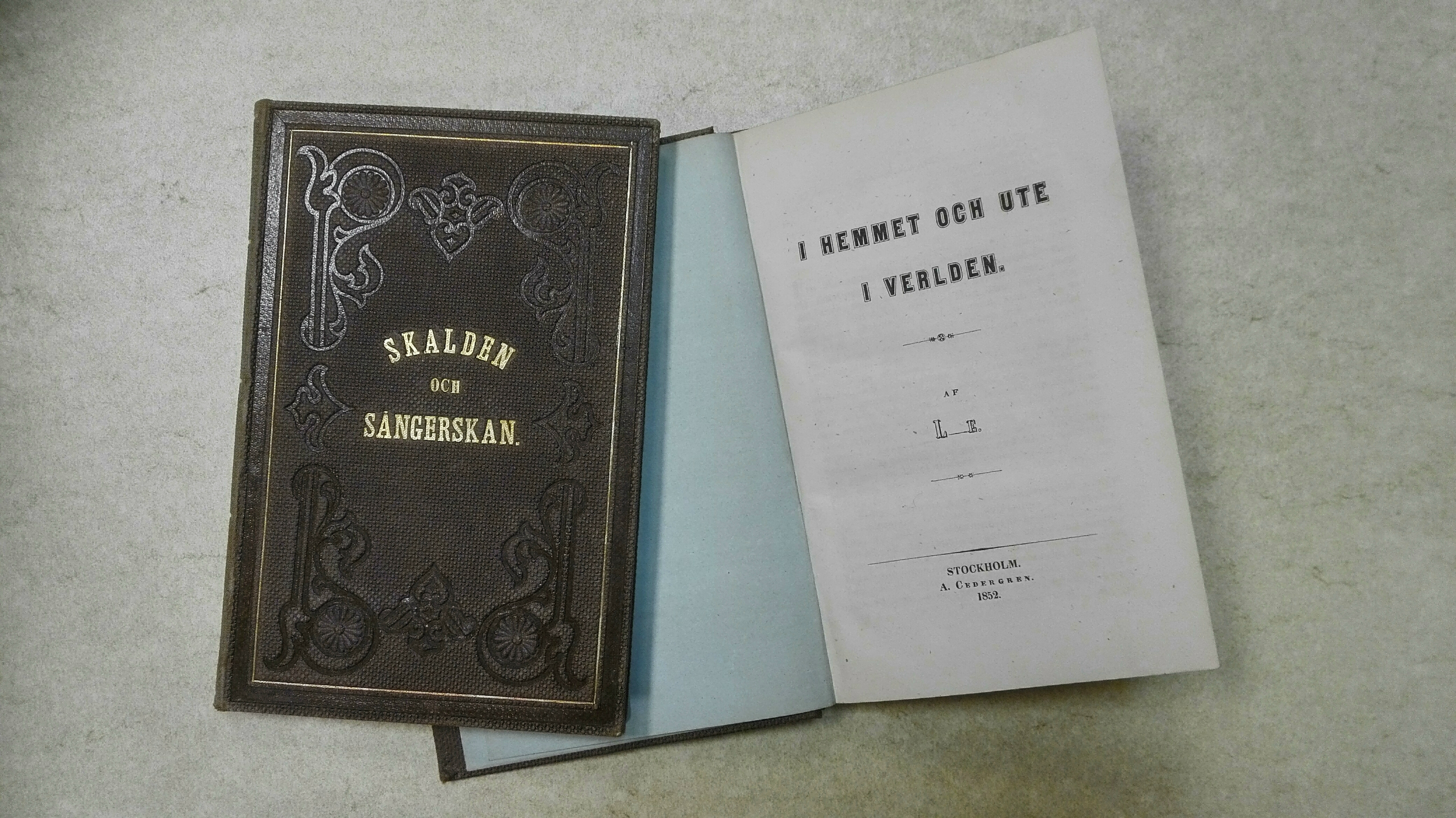 Romanerna "Skalden och sångerskan" och "I hemmet och ute i verlden", utgivna hos boktryckare A. Cedergren i Stockholm 1852.